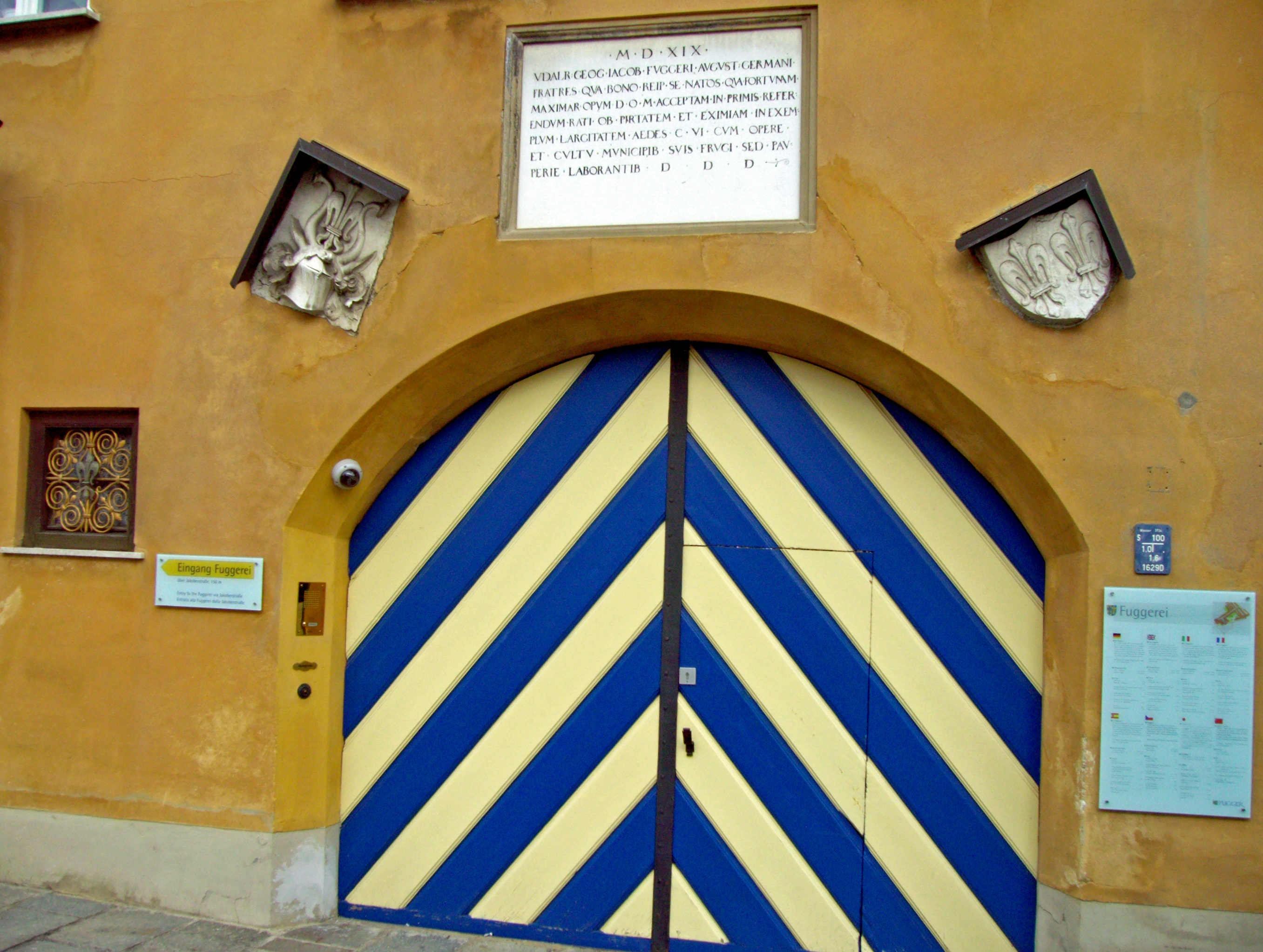 Fuggerei, Augsburg, Seiteneingang.